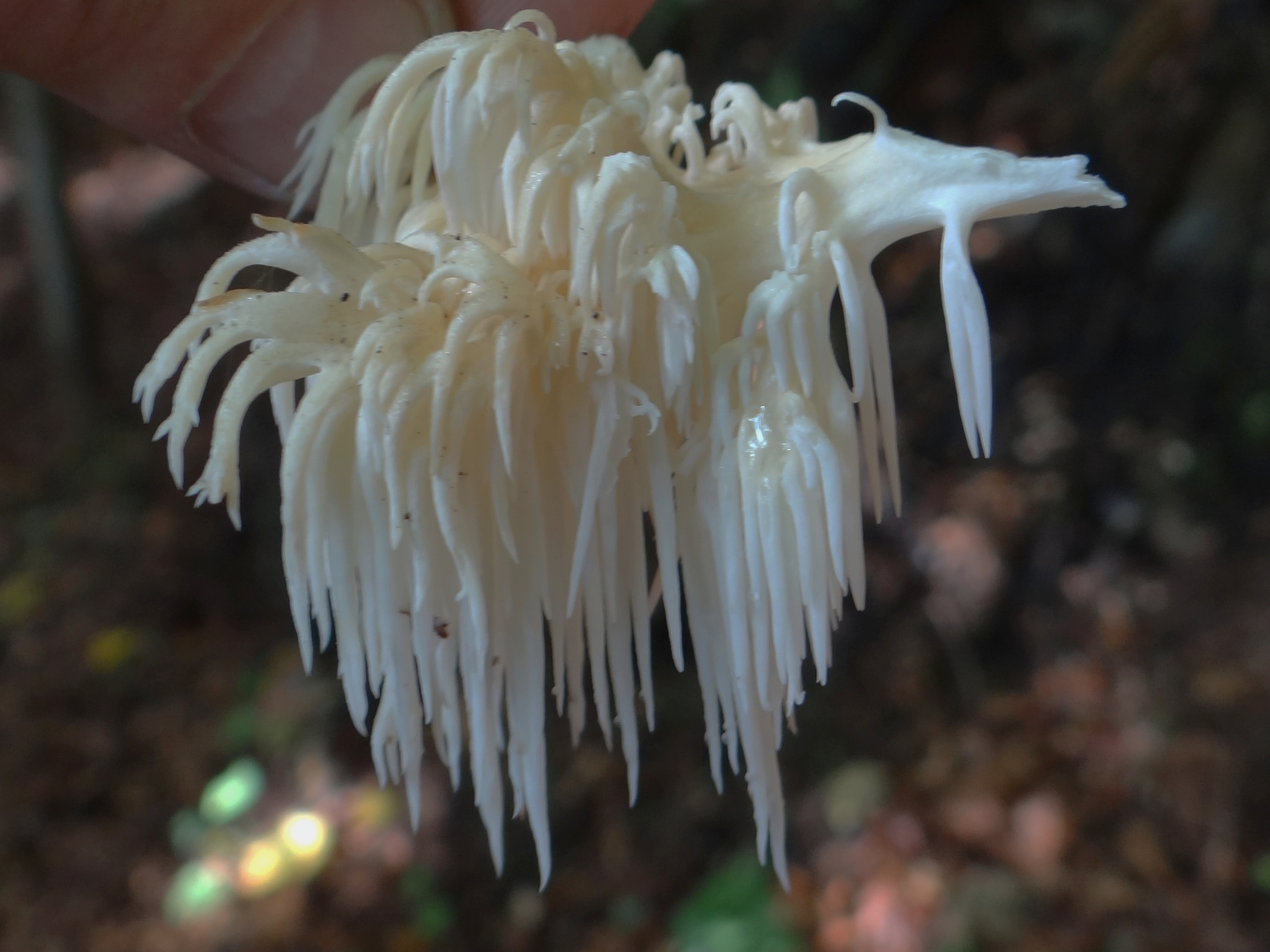 Hericium alpestre ona Abies alba (location:Poland, Pieniny, podnóża Trzech Koron, przy zielonym szlaku ze Sromowiec Niżnych na przełęcz Wyżni Łazek)